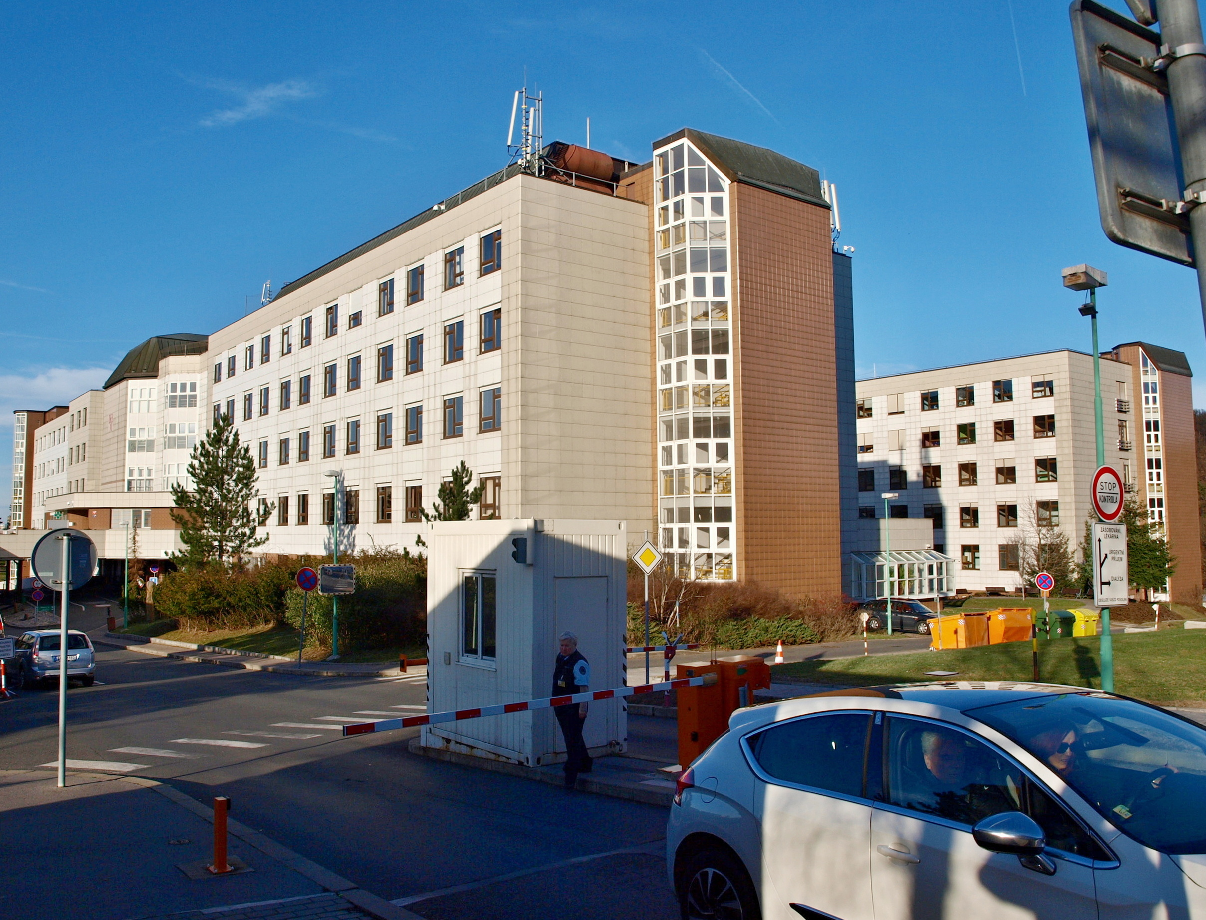 IKEM, Praha 4-Krč